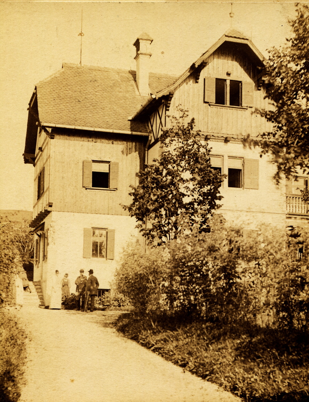 Benczúr Gyula nyaralója a Starnbergi-tó melletti Ambachban